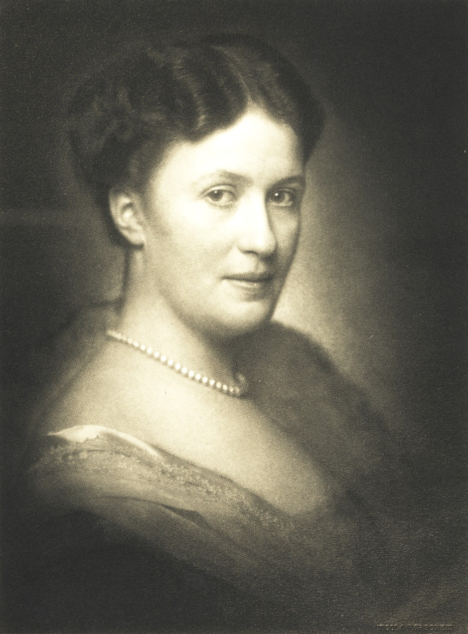 Portraitfoto der Industriellengattin Bertha Krupp.